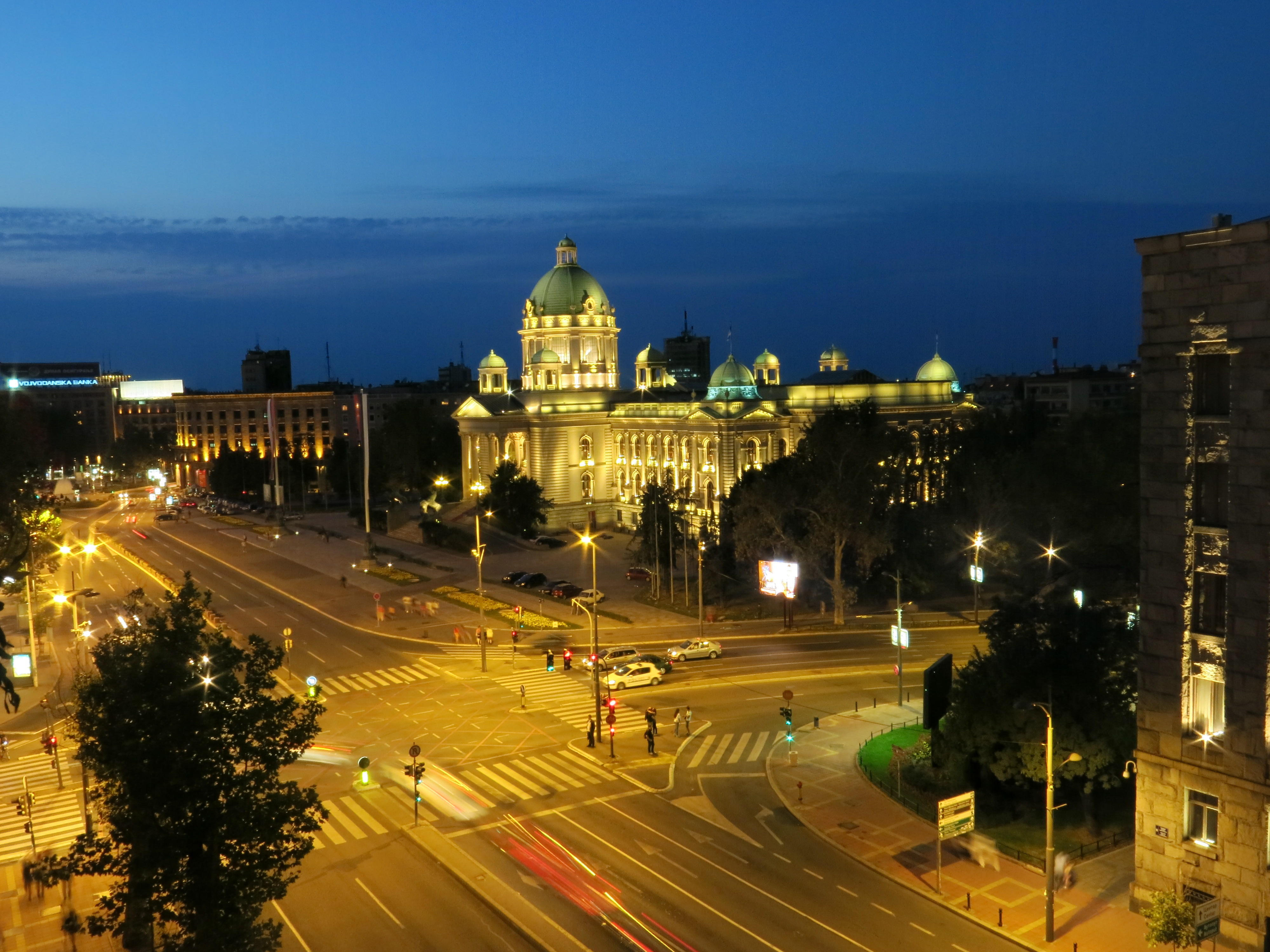 Зграда Народне скупштине